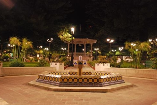 Jardín principal "Ana María Gallaga", Pénjamo, Guanajuato.